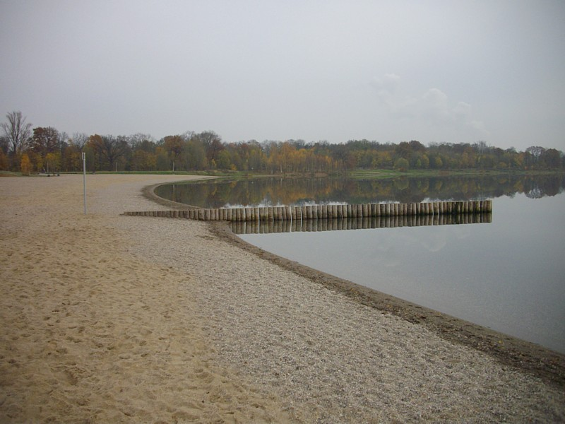 Leipziger Strand, auch Nordstrand genannt, am Nordufer des Cospudener Sees, die Bäume im Hintergrund gehören zu Markkleeberg.